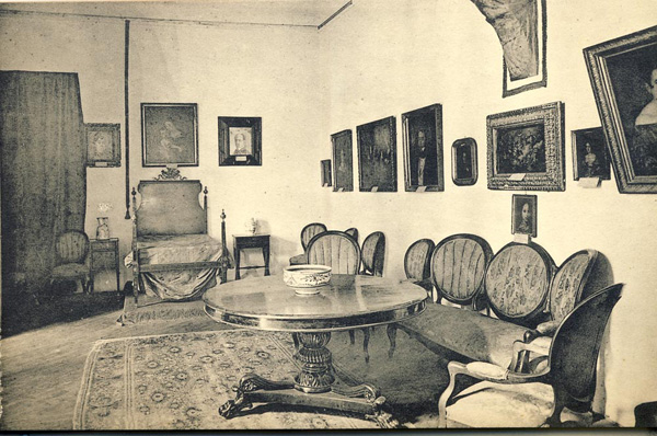 Vista de la llamada Sala de familia en 1924. Antiguo montaje del Museo Romántico.